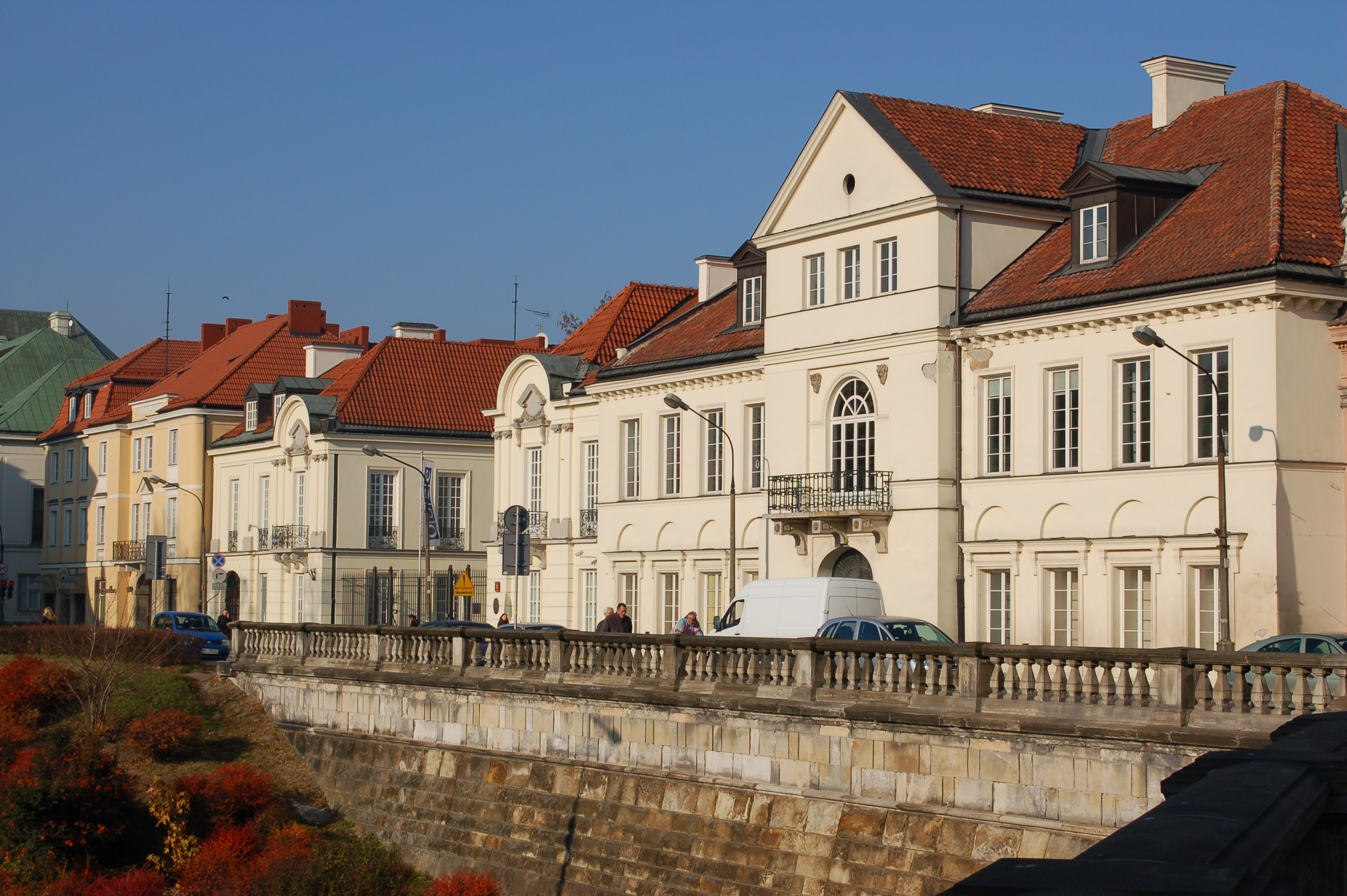 Warschau, Miodowa-Strasse